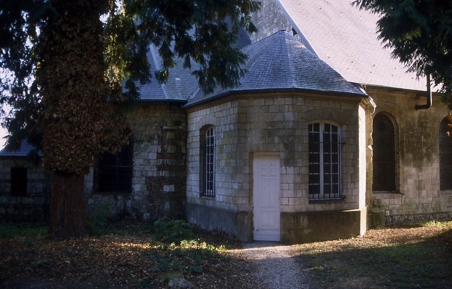 Le château de couin la tribune donnant sur le choeur de l'église